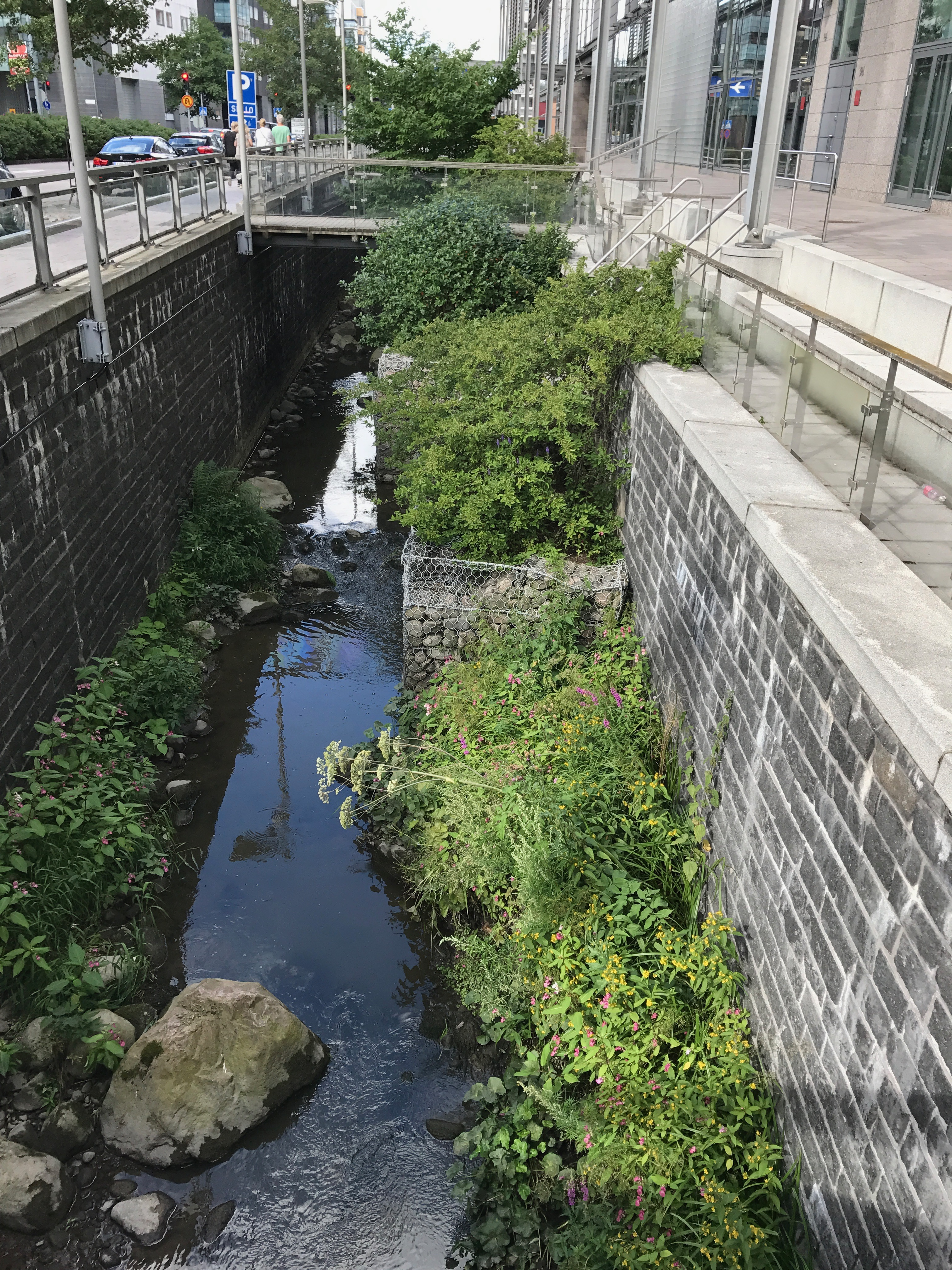 Monikonpuro kauppakeskus Sellon vieressä.